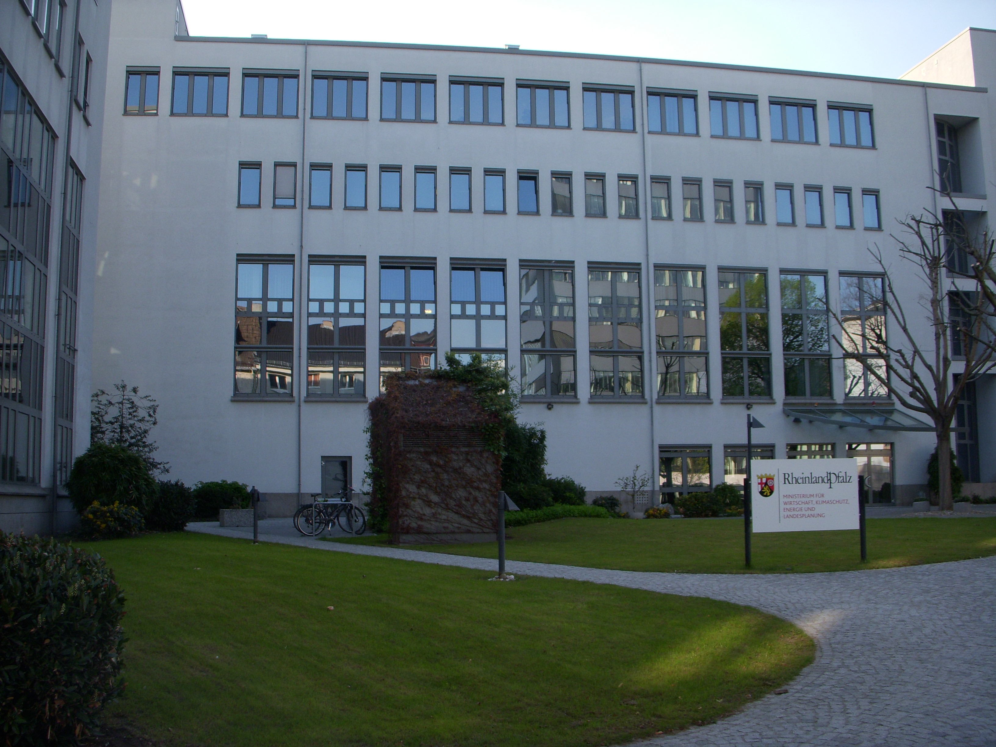 Ministerium für Wirtschaft, Klimaschutz, Energie und Landesplanung RLP